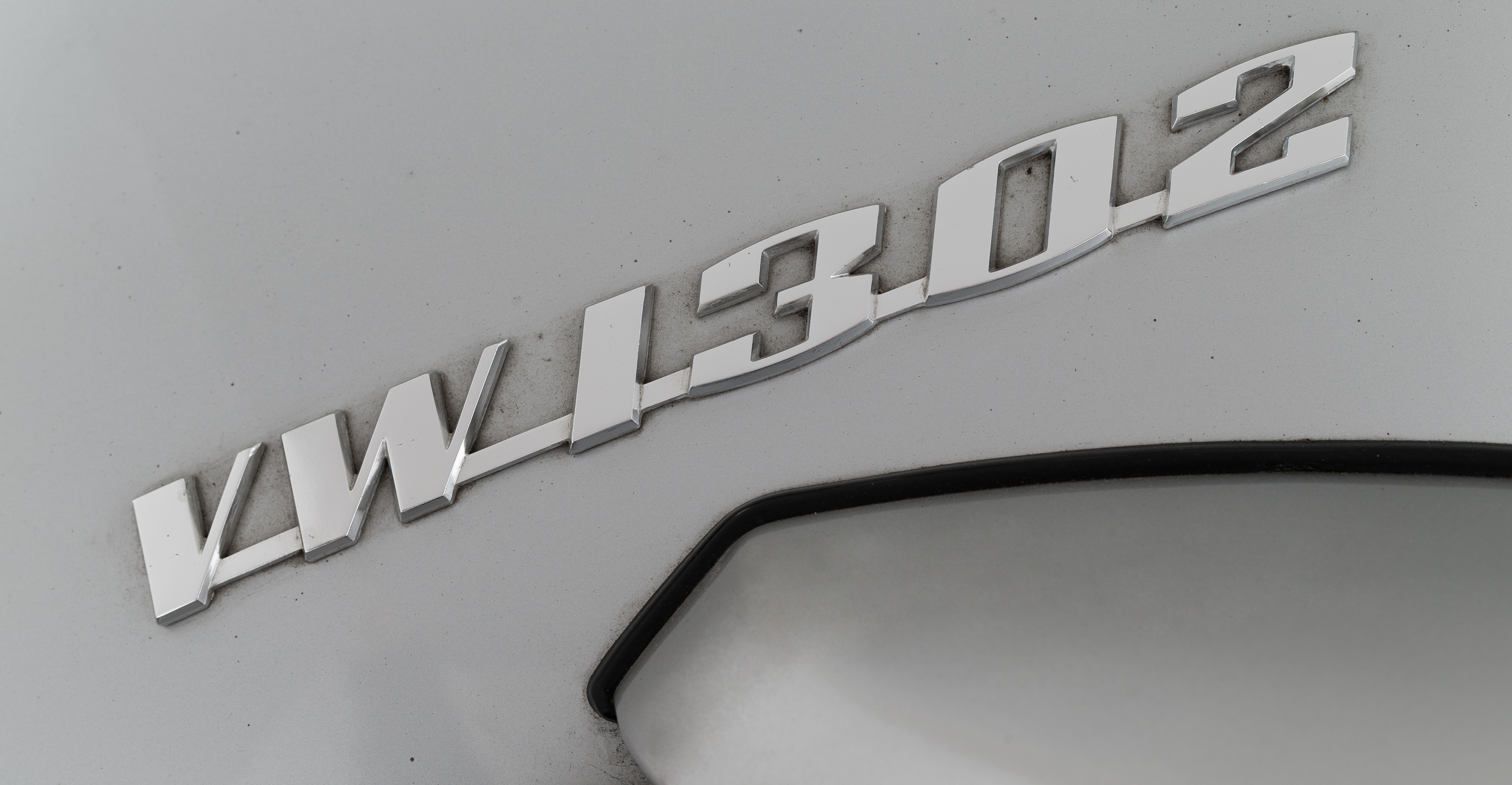 Typenbezeichnung "VW 1302" auf dem Heck eines VW 1302, Modell 1302 Limousine, Farbe silber-metallic L 96 D, Baujahr 1970.